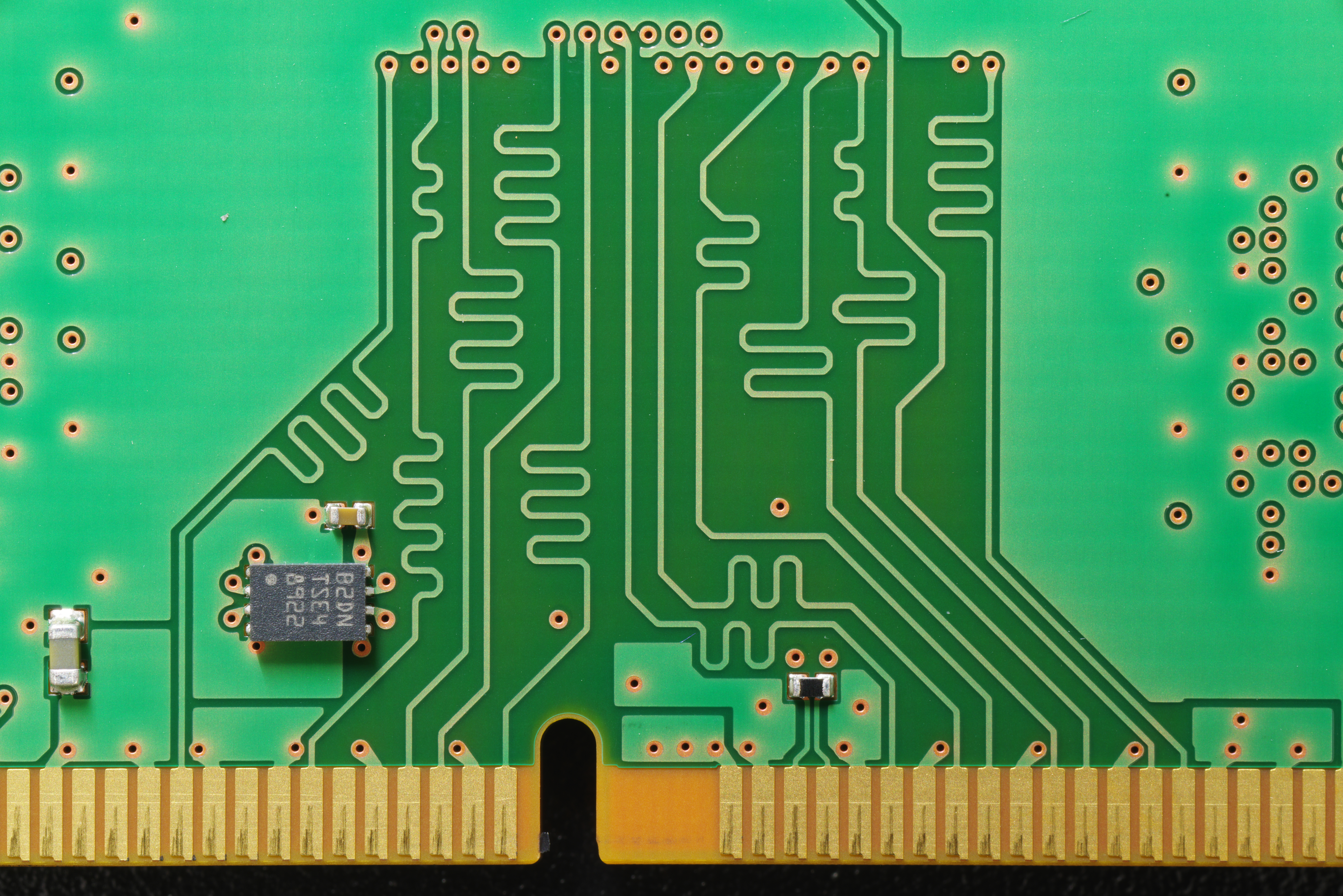 Mäanderförmig verlegte Leiterbahnen auf einem DDR4-Speicherriegel. Die künstliche Verlängerung der Leiterbahnstrecke dient dem Ausgleich von Laufzeitunterschieden bei parallelen Bussen, aber auch bei differentiellen Einzelsignalen hoher Frequenz. Bei dem IC links unten handelt es sich um einen Temperaturüberwachungsbaustein mit integriertem SPD-Eeprom STTS2004 von STMicroelectronics.